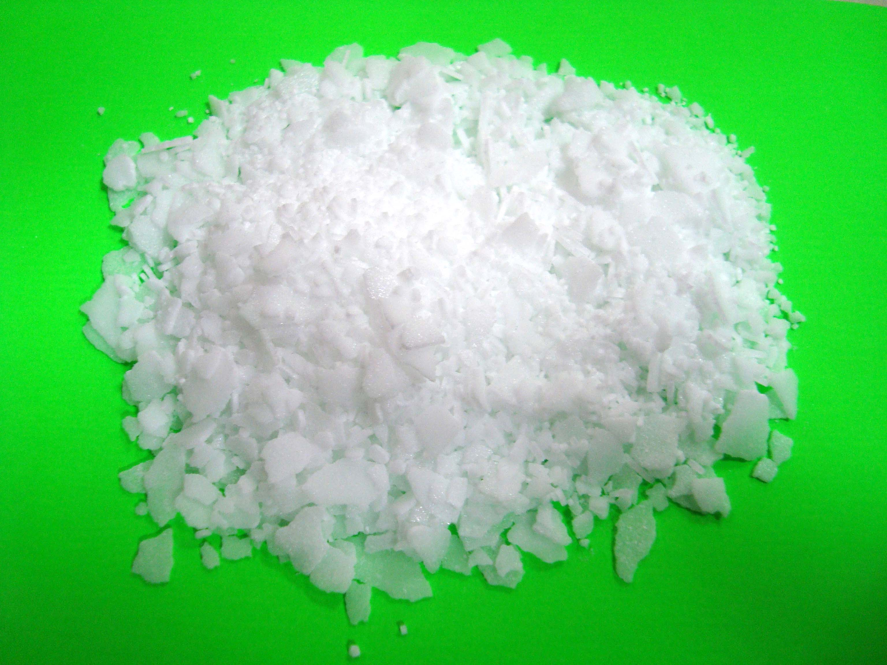 Stearin krystalický - obsah z obchodního balení šupinky